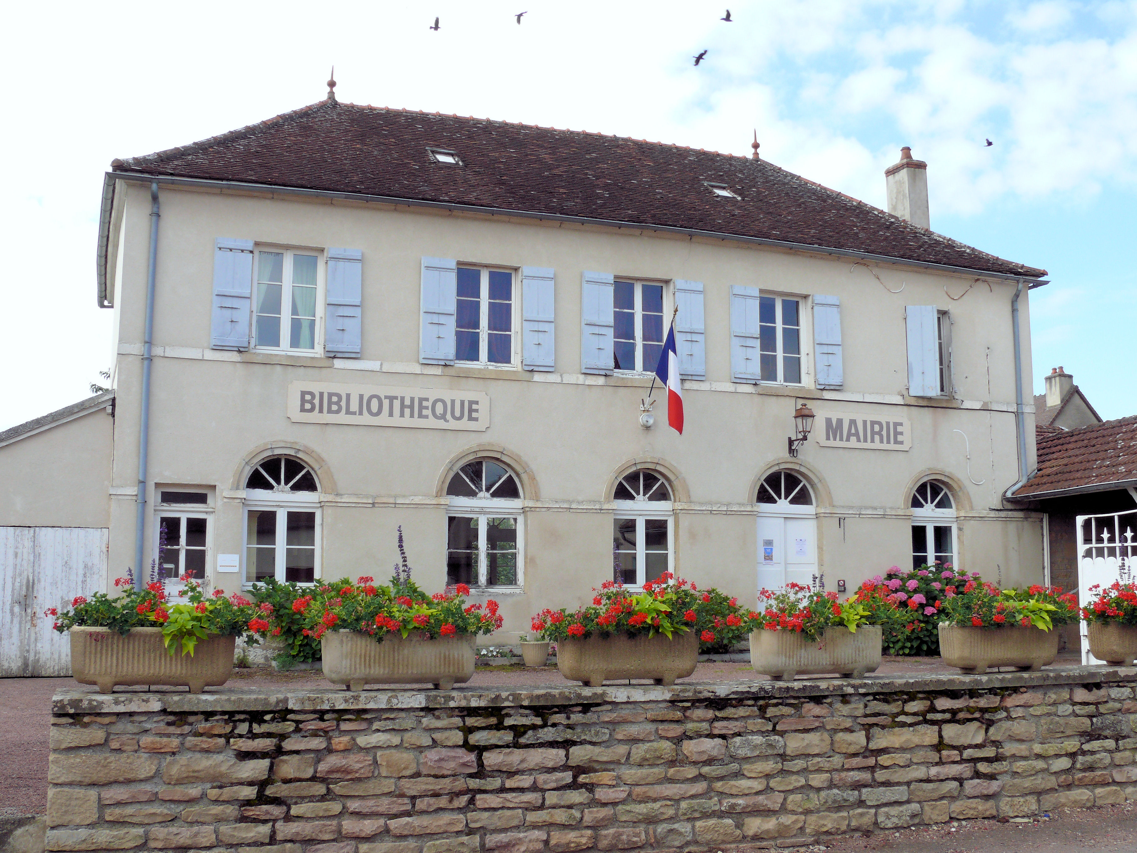 Saint-Boil - Mairie et bibliothèque